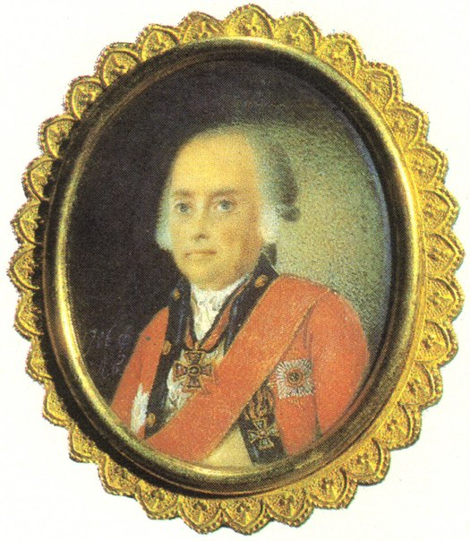 Матвей Семёнович Бегичев